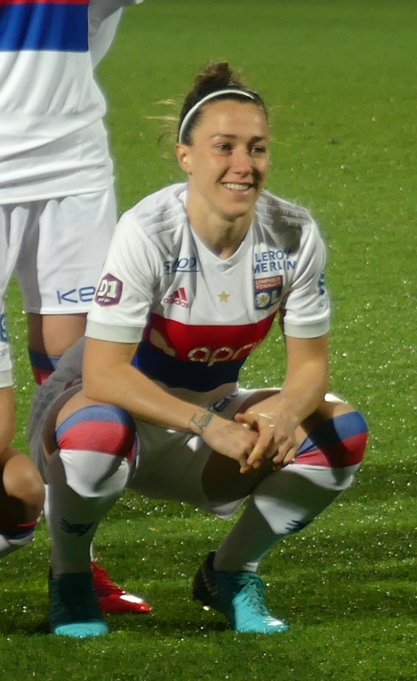 Lucy Bronze avec l'Olympique lyonnais en février 2018.